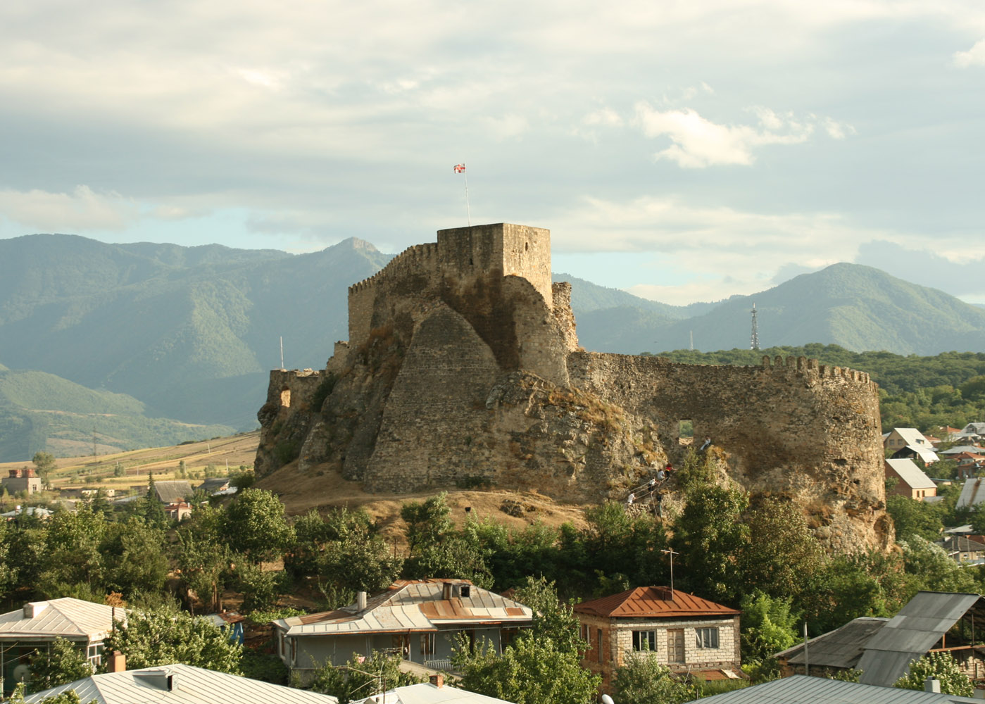 Сурамская крепость. Крепость в городе Сурами